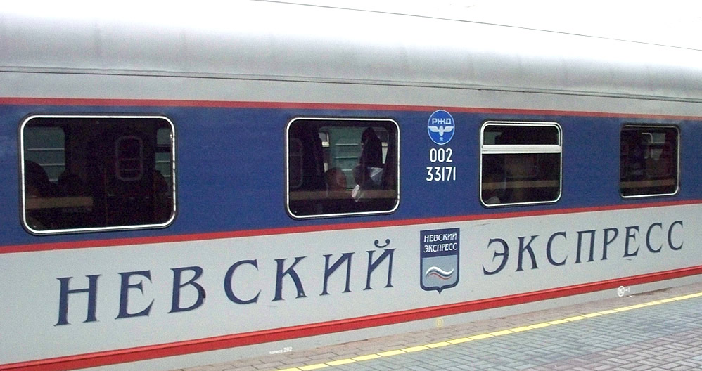 Вагон поезда "Невский Экспресс"